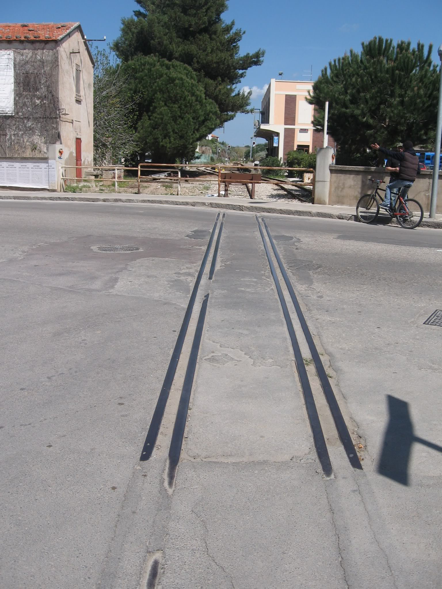 אלגרו היא עיר בצפון סרדיניה.היה בה קהילה יהודית עד לגירושה בשנת 1492